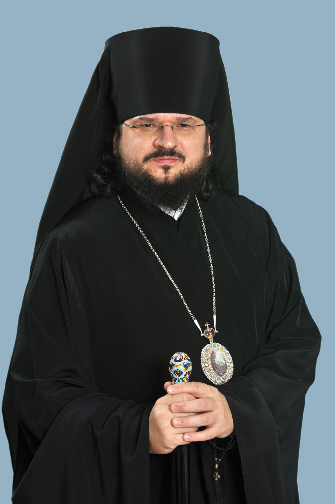 Епископ Якутский и Ленский Роман